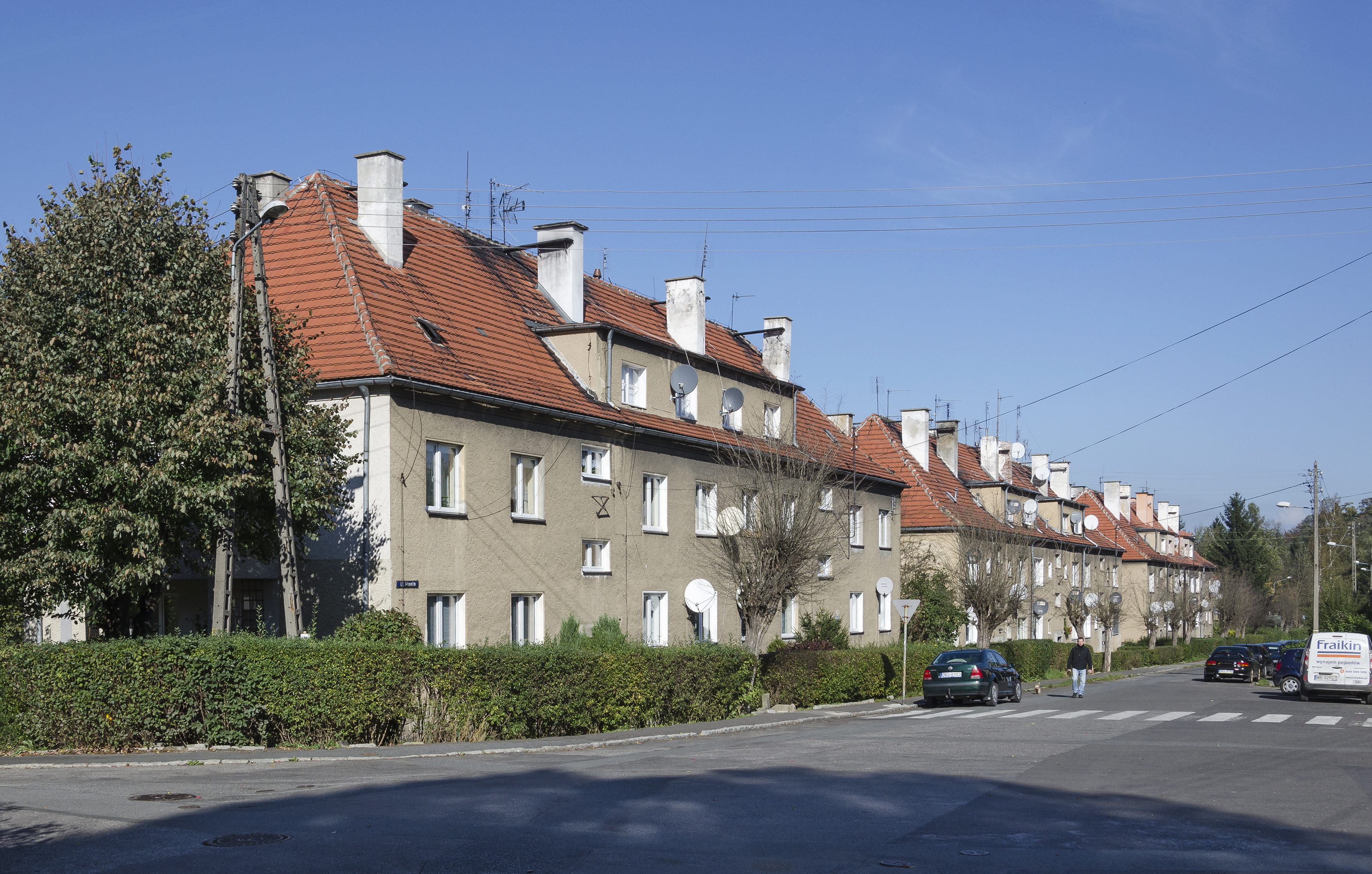 Kłodzko, ul. Ptasia